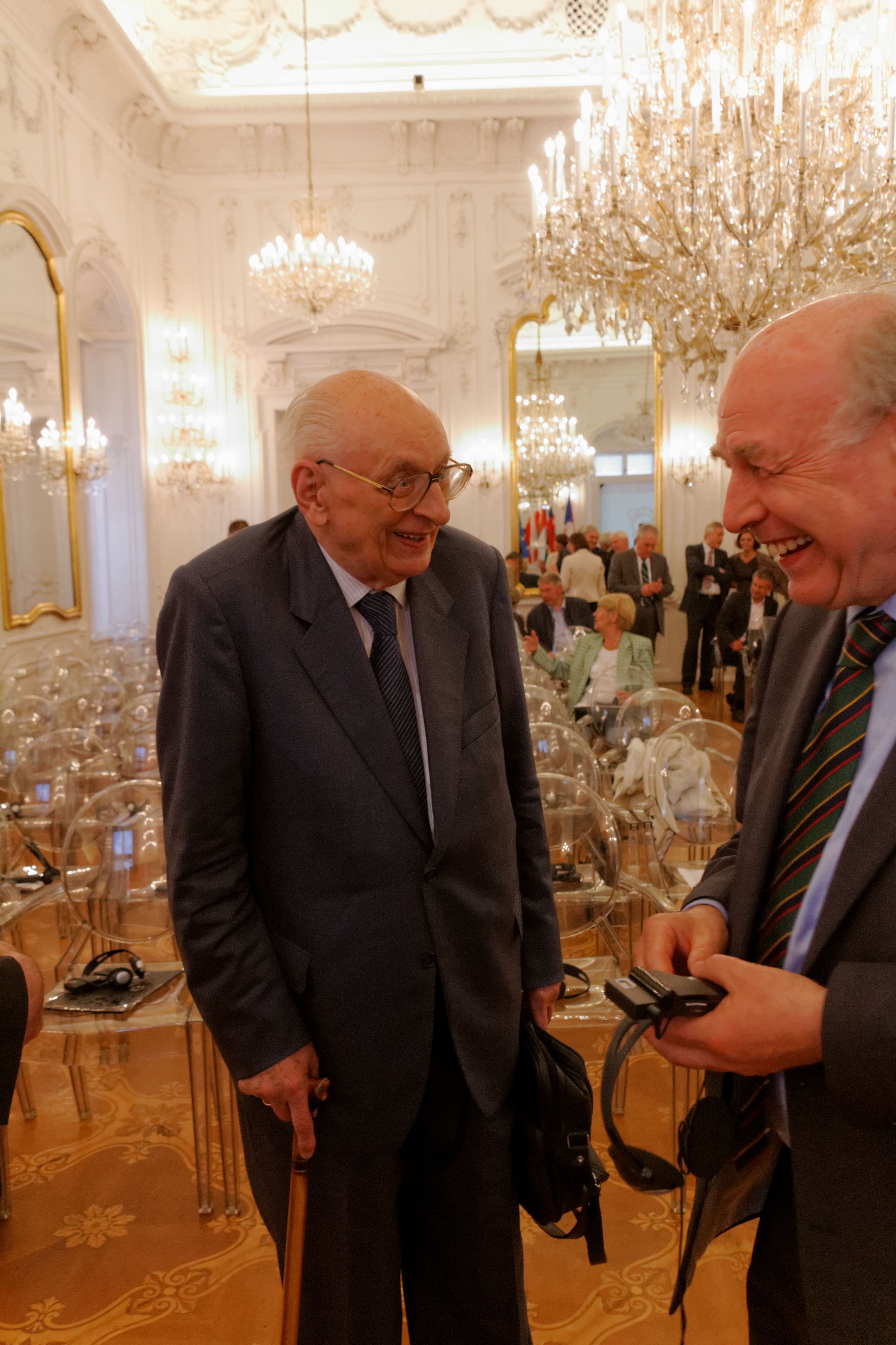 Dr. Georg Paul Hefty im Gespräch mit Władysław Bartoszewski; Andrassy Universität Budapest